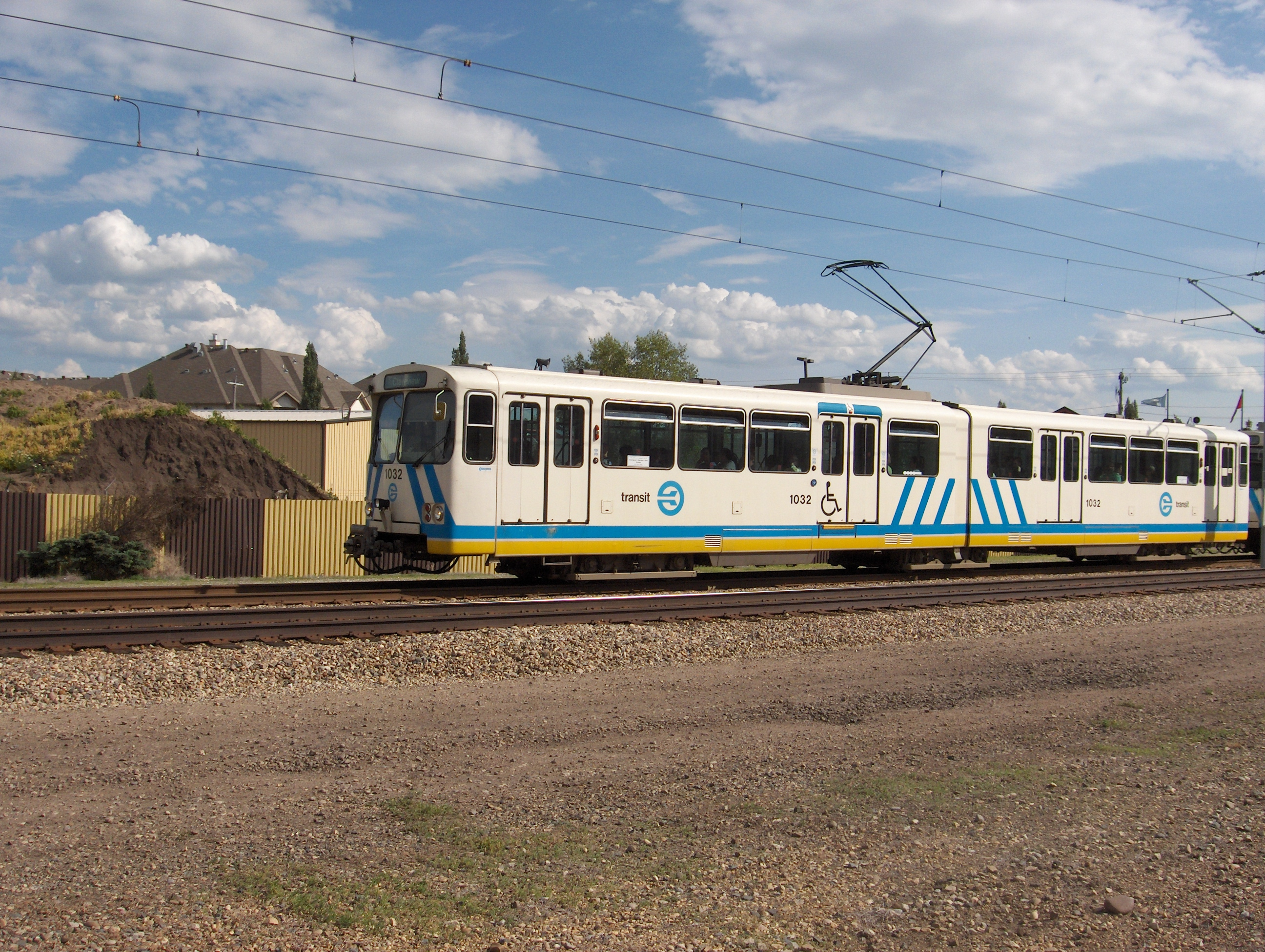 Поезд Эдмонтонского метро (вагон Siemens 1032)